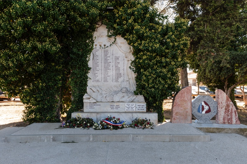 Monument aux morts - Archives départementales de l’Hérault - FRAD034-2637W-Mauguio-00001